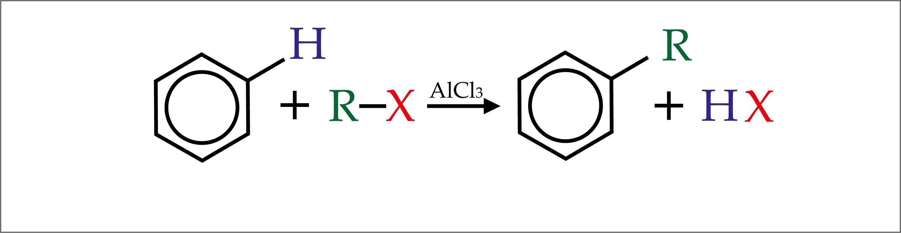 Reação resumida universal do do processo de Alquilação de friedel-crafts